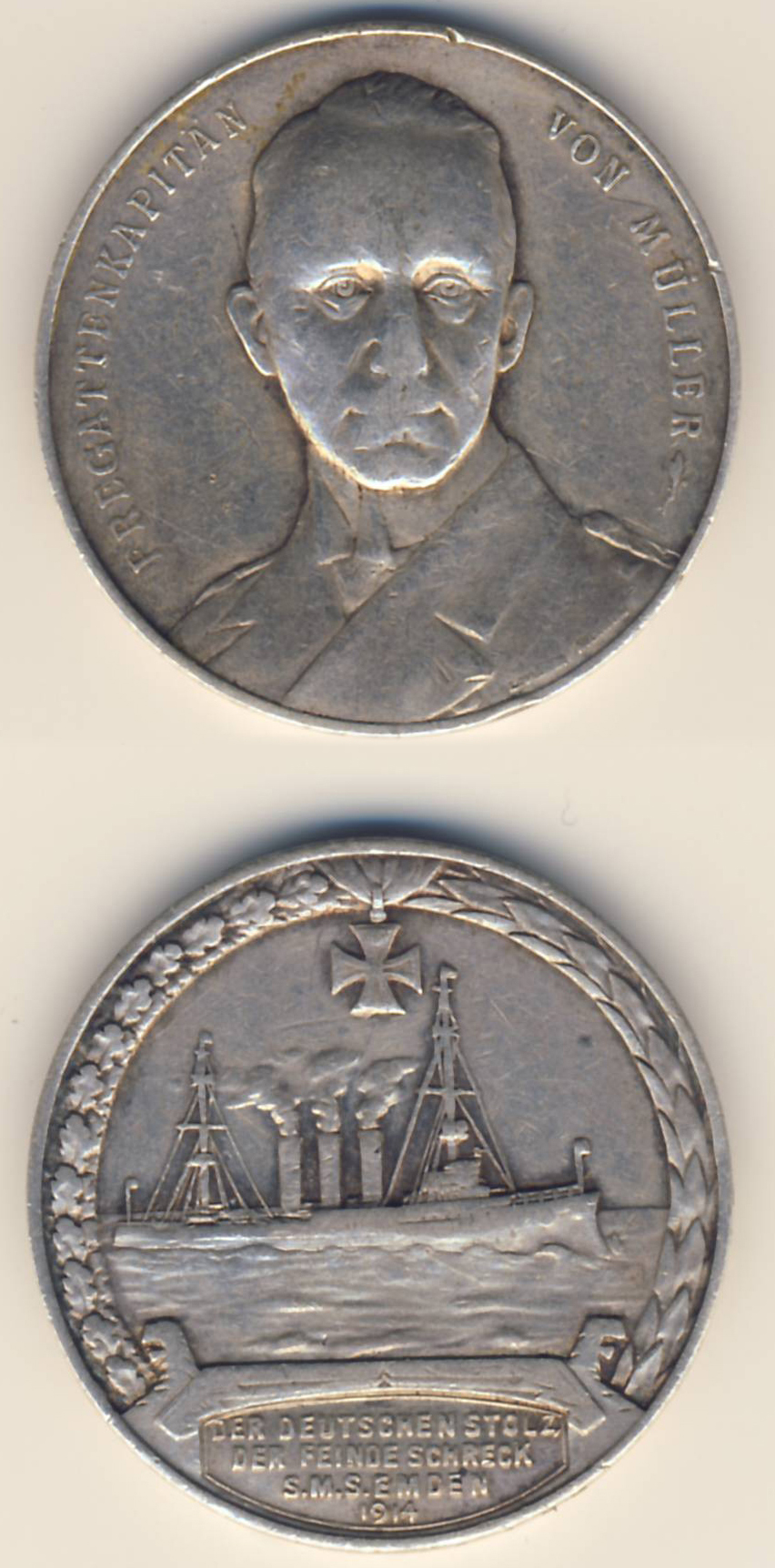 Emden Gedenkmuenze von 1920